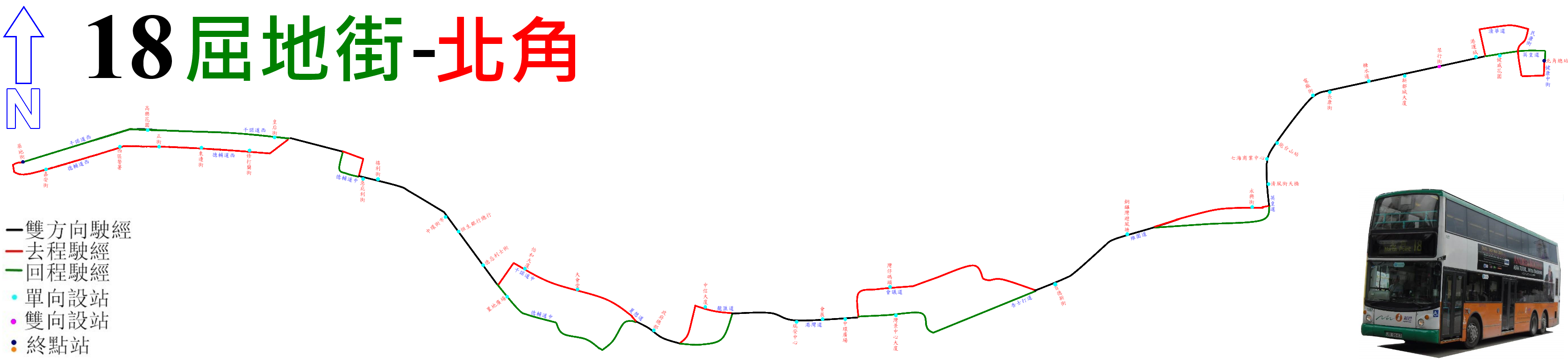 中文（香港）: 新巴18號線的走線圖